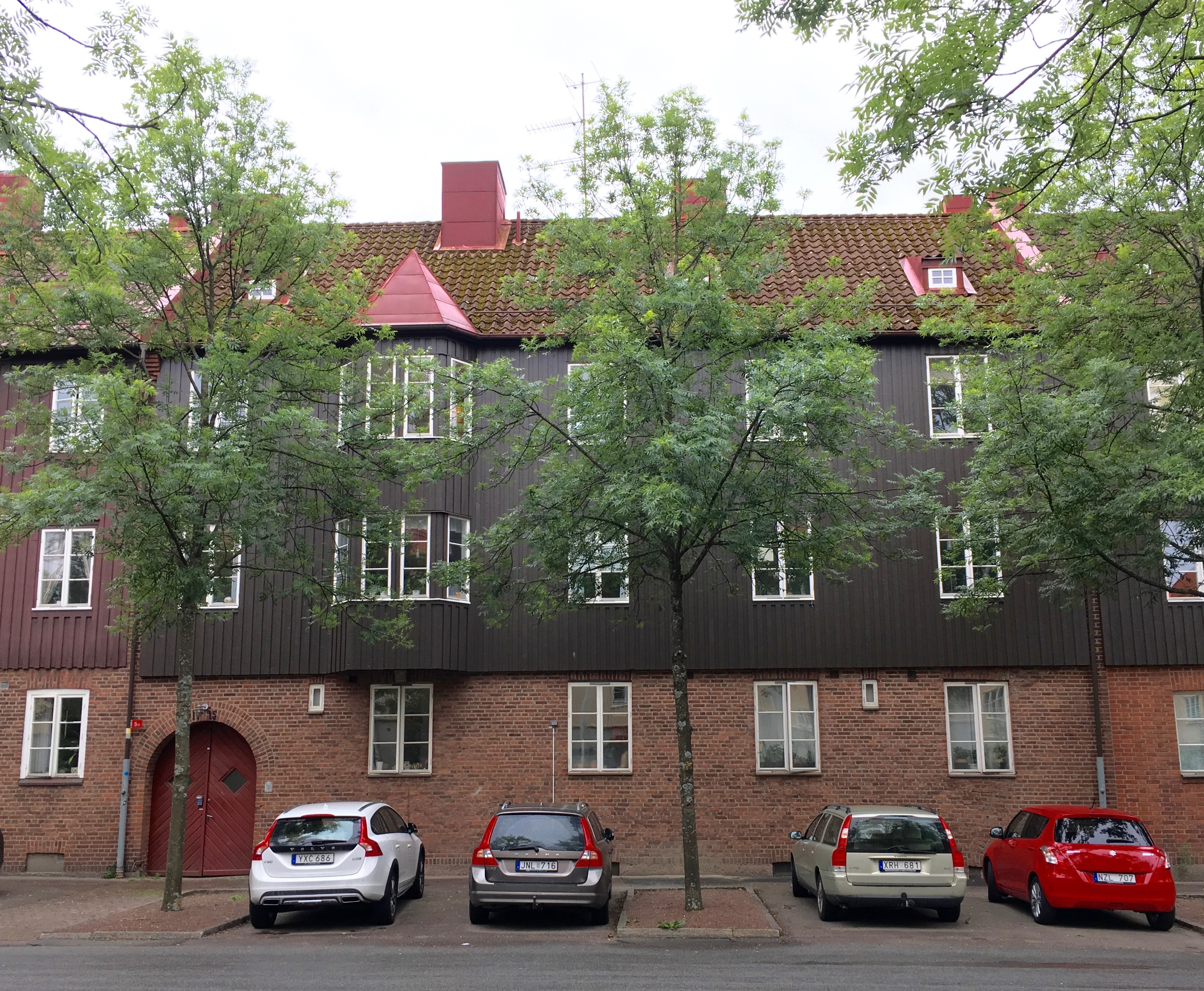 Falkgatan 15 i Bagaregården, Göteborg. Huset ritades av Hjalmar Zetterström och byggdes 1915.